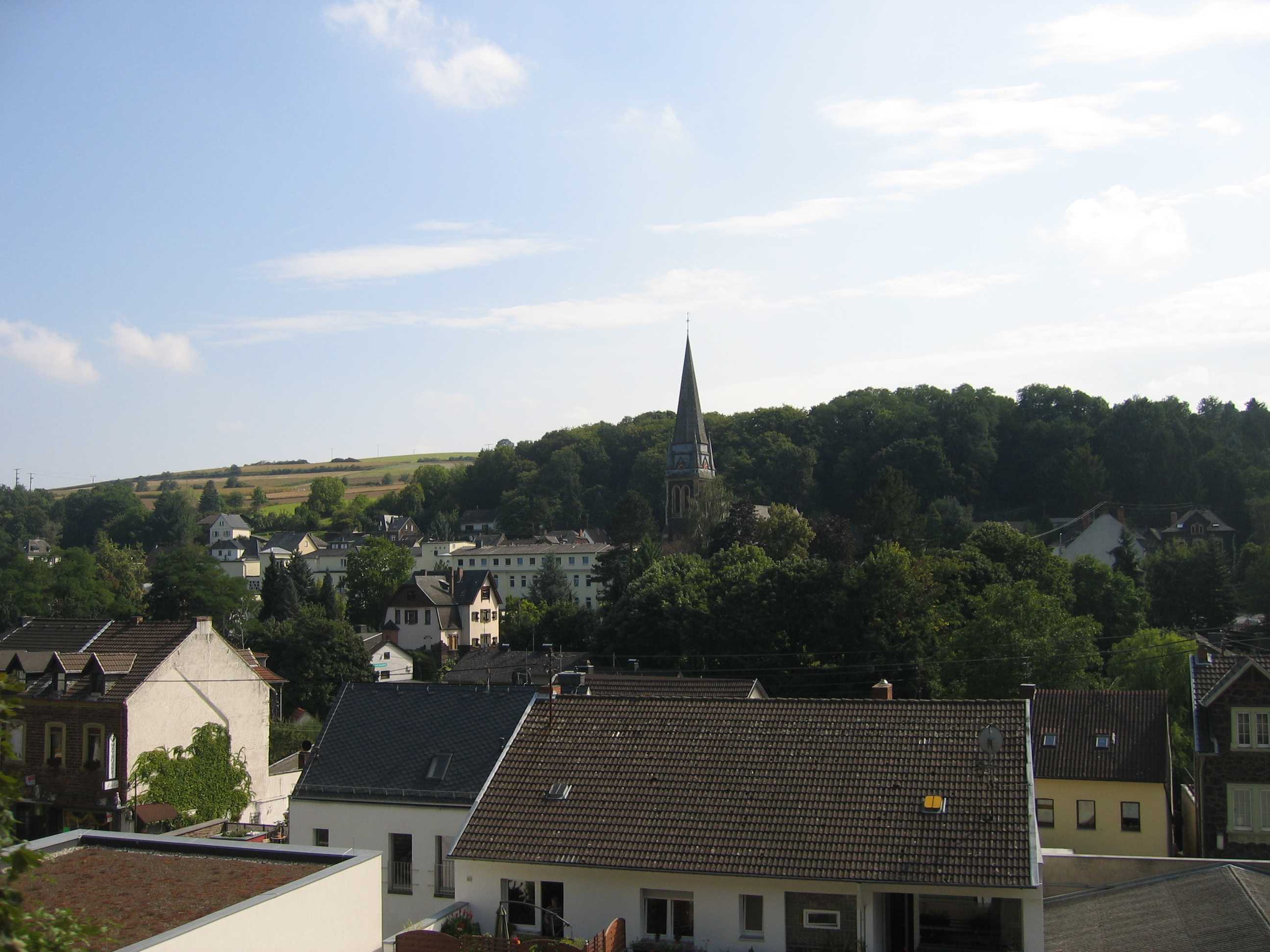 Blick auf den Ort Burgbrohl aus der Brohltalbahn